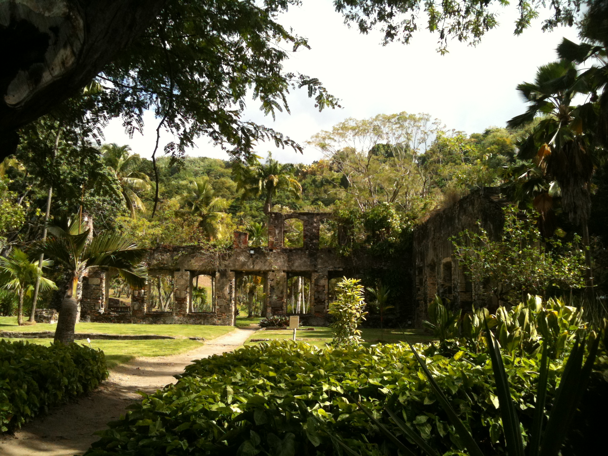 Habitation Anse Latouche, ruine de la maison du maître